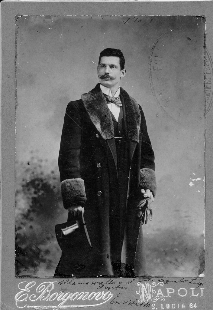 Immagine di Nelson le Follet, d'arte di Bartolomeo Viganego (detto Enrico). Archivio dei Conti Clerici (Milano). Fondo famiglia Costa e Viganego